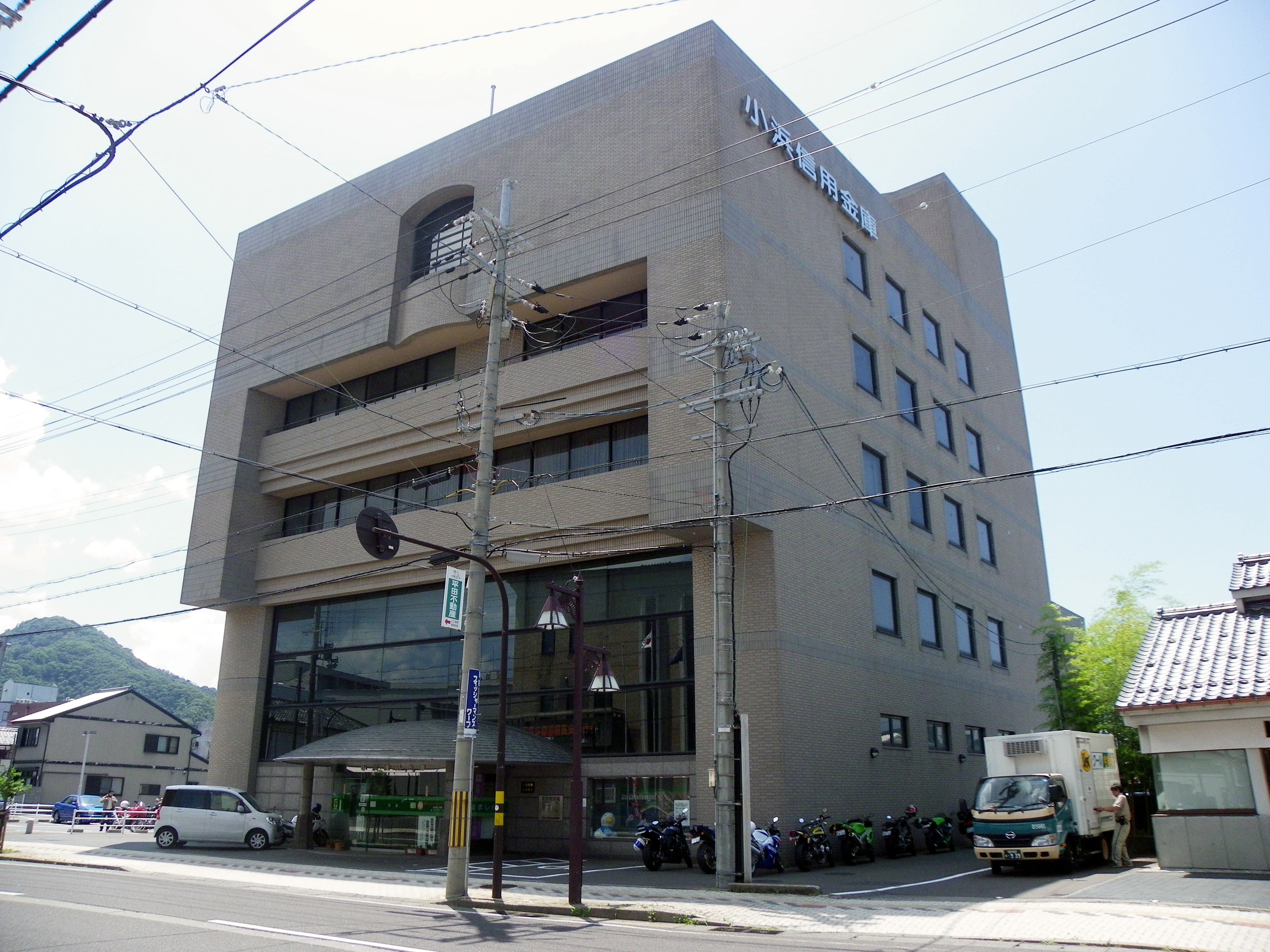 小浜信用金庫本店